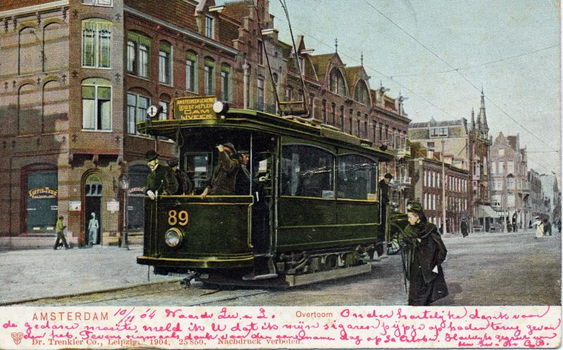 Photographed in Amsterdam between 1900 and 1914. Motorwagen 89 op tramlijn 1; circa 1904.